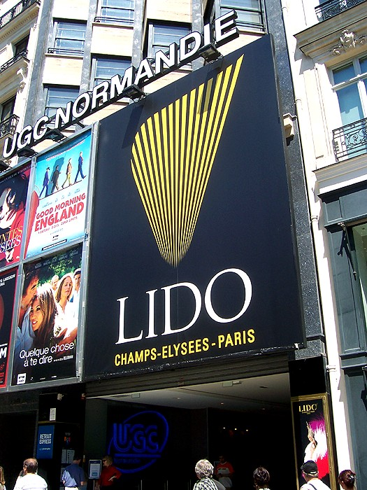 Parigi - Lido